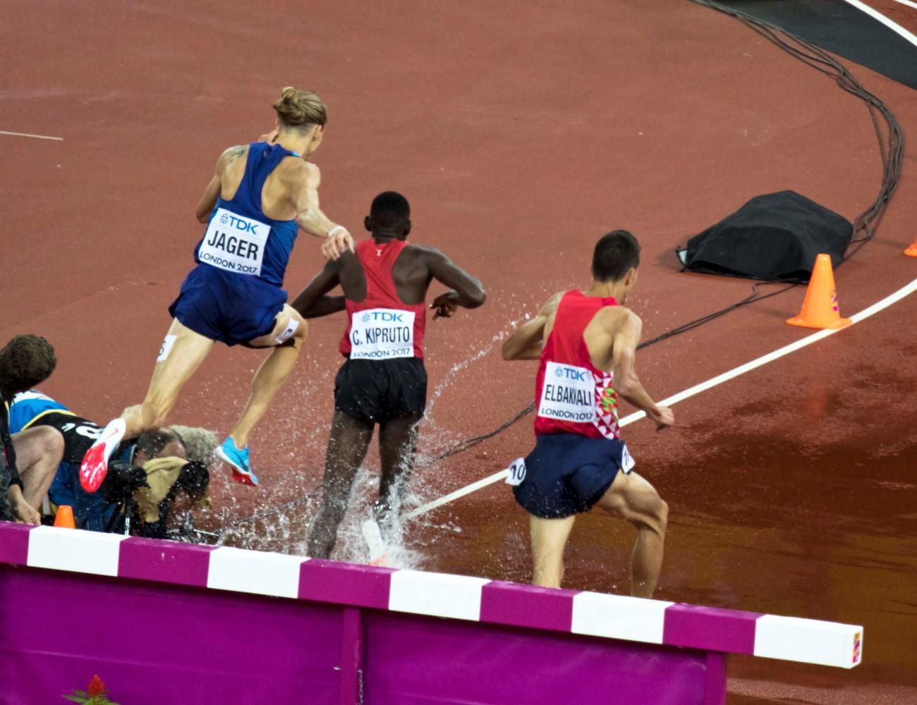 d4_22 3000m steeple finale mannen